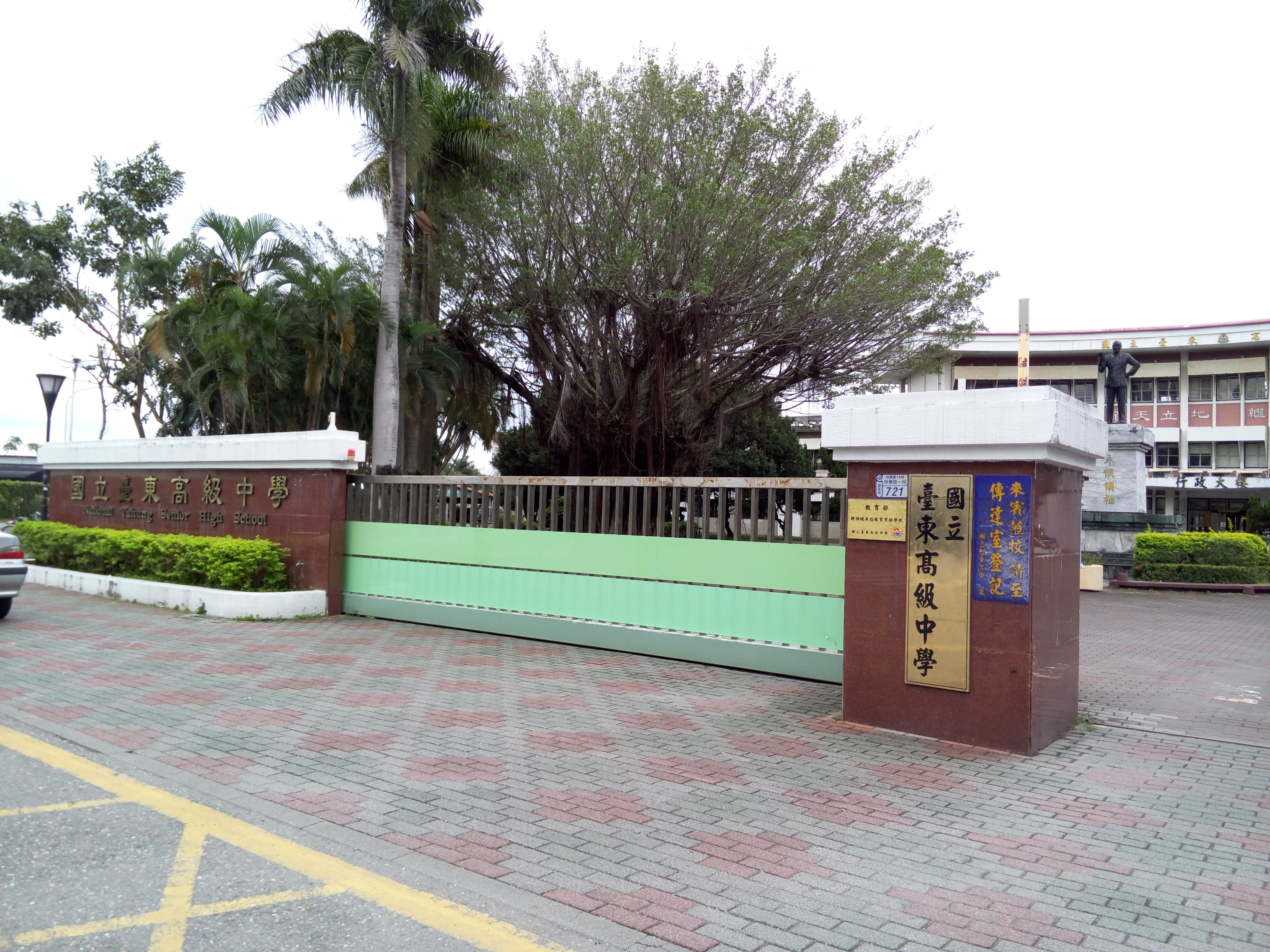 國立臺東高級中學 大門